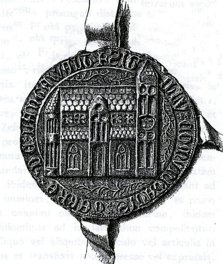 Zegel van het landschap Langewold met de oude kerk van Sebaldeburen; Gebruikt bij oorkonden, bijvoorbeeld in 1531 en 1562. Tekst: 'SIGILLV[M] COM[M]VNITATIS TER[R]E DE LANGAWALT'; "zegel van het landschap Langewold"